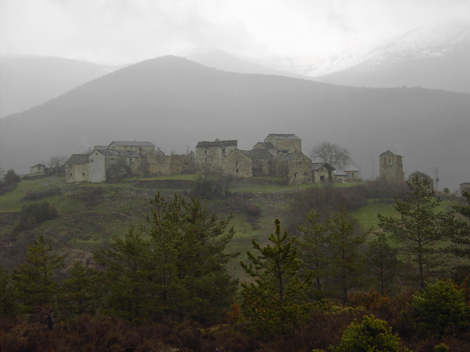 Buisán, en el municipio Sobrarbés de Fanlo. Bajo el aguanieve.